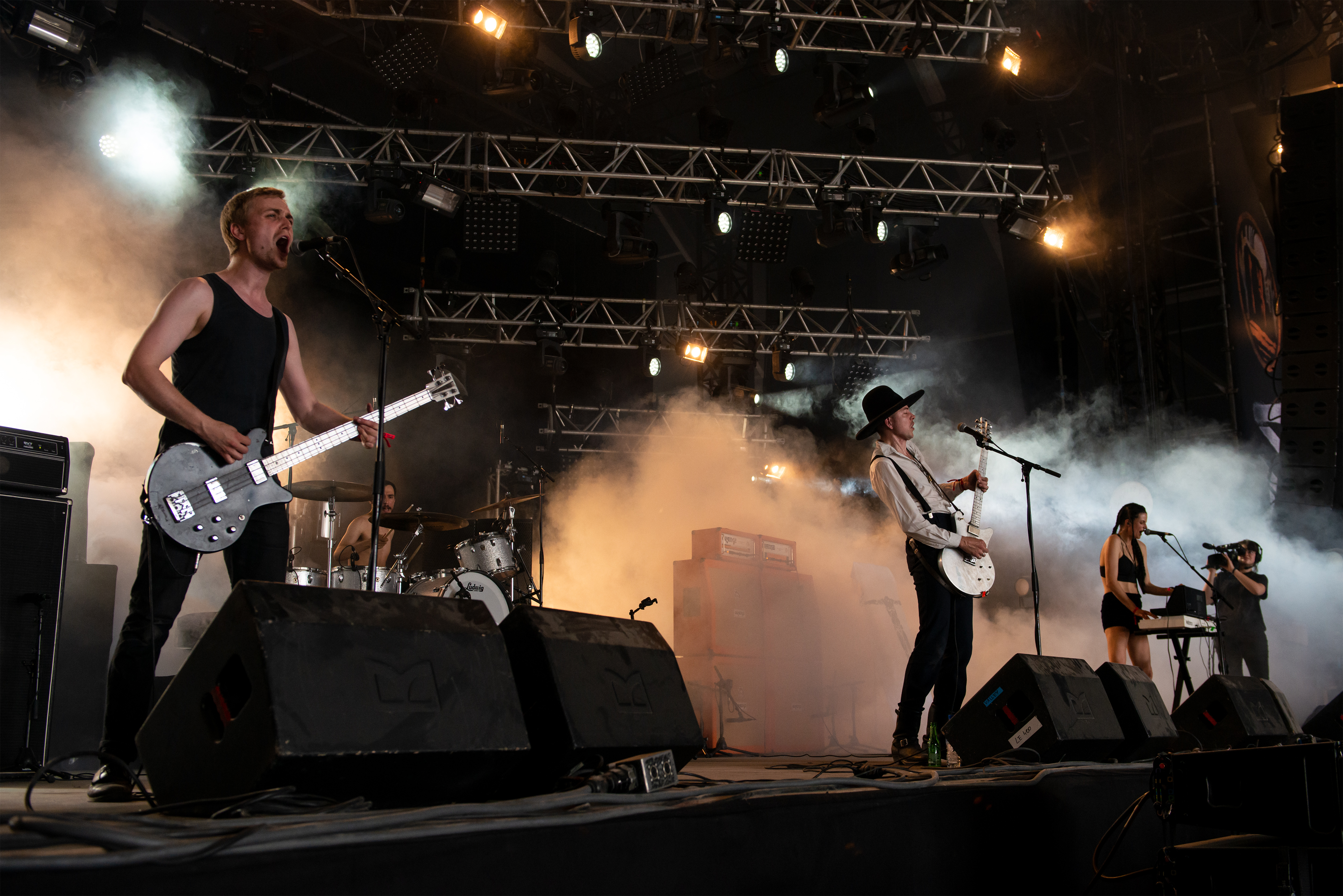 Concert du groupe Arabrot au Hellfest 2019.